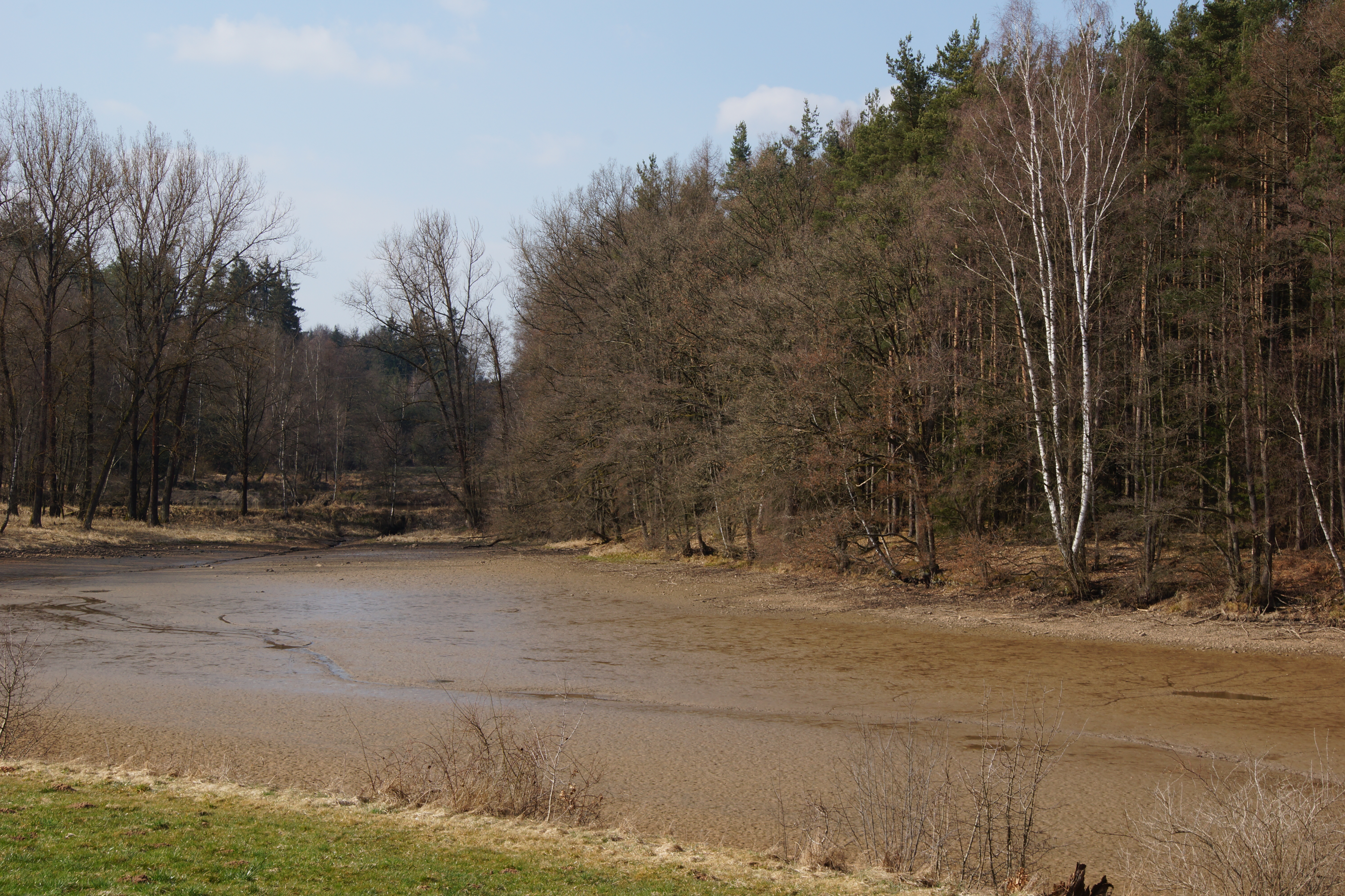 Der Lothosweiher zwischen Hirschau und Ehenfeld